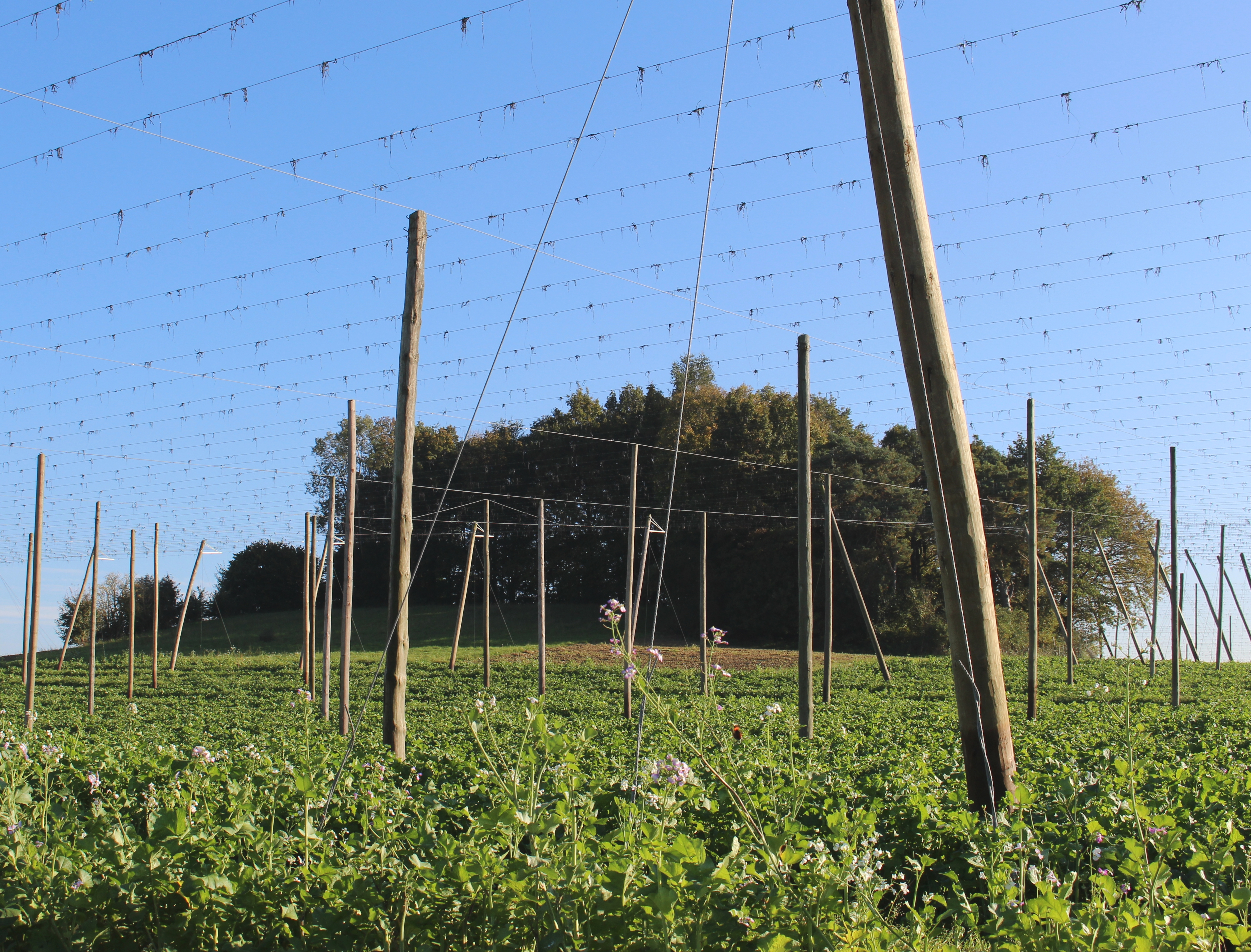 Niederulrain, Stadt Neustadt (Donau), Landkreis Kelheim, Niederbayern: Auf dem Nussberg befand sich die 1388 zerstörte Burg Niederulrain